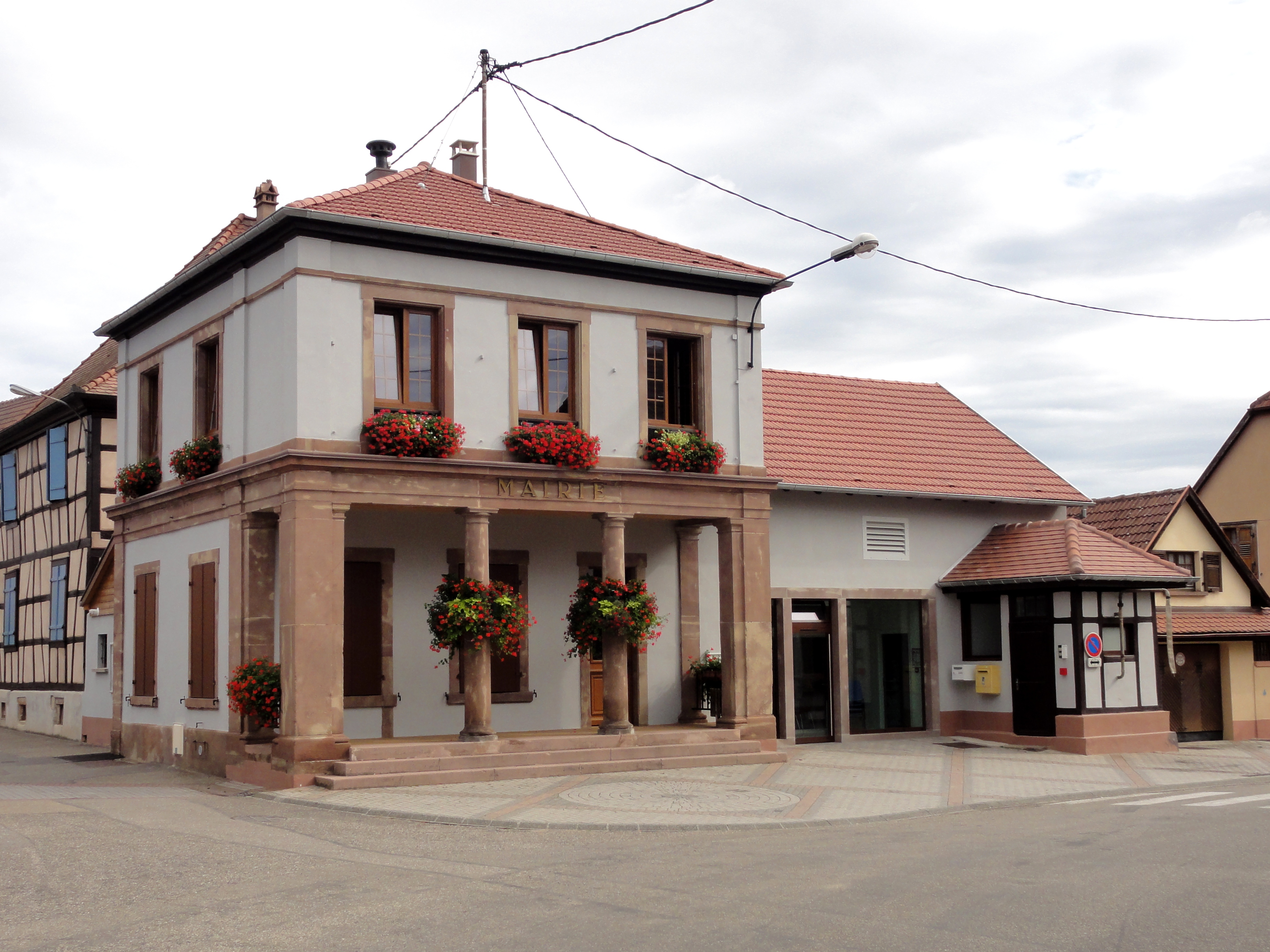 Alsace, Bas-Rhin, Zellwiller, Ancien corps de garde, aujourd'hui mairie (XIXe-XXe), 47 rue Principale. .